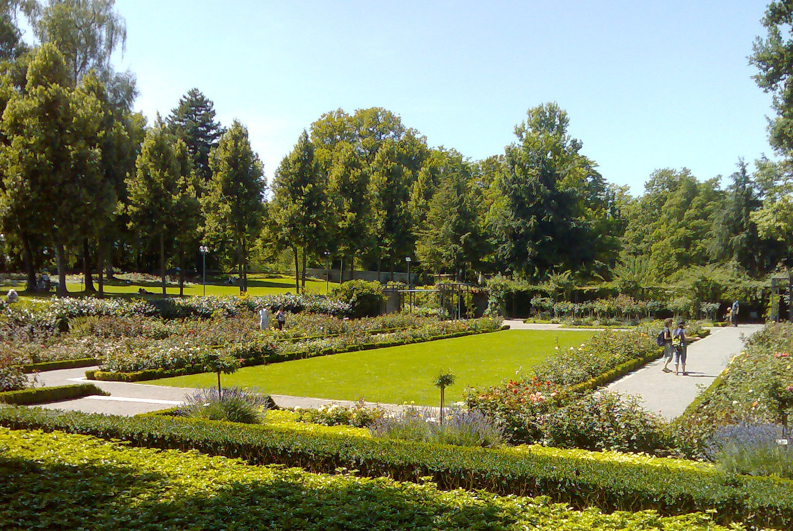 Teil-Ansicht der Parkanlage Rosengarten in Bern (Schweiz)